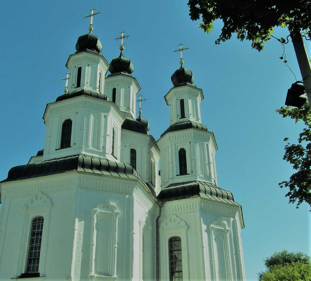 cerkiew w Izium obwód charkowski